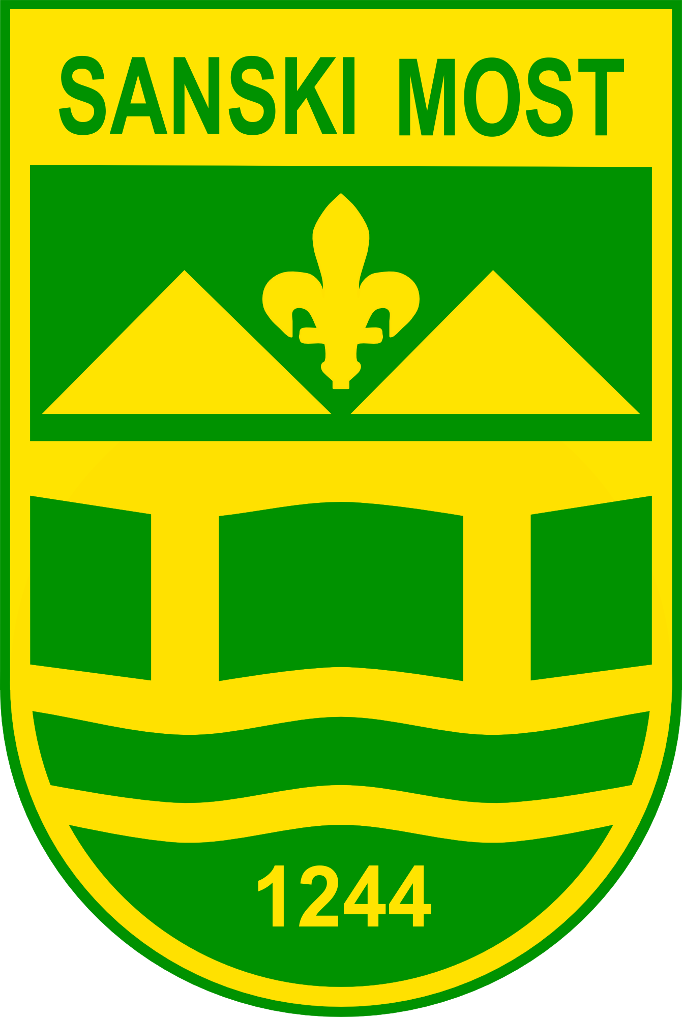 Grb Sanskog Mosta